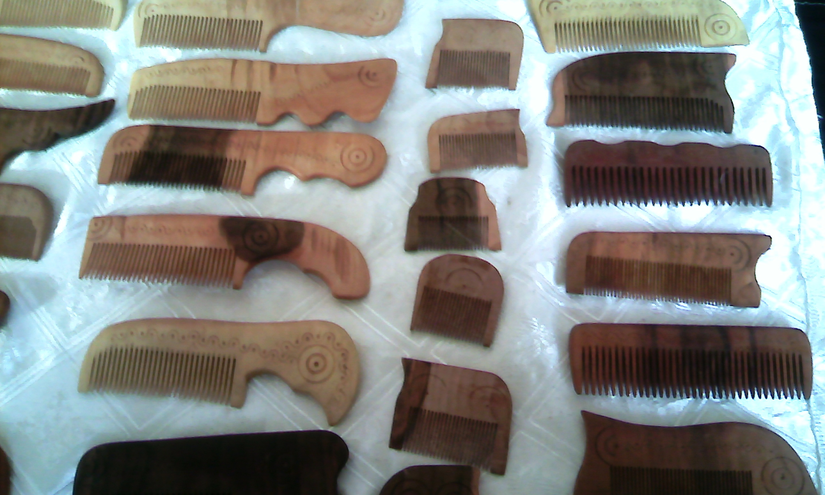 Деревянные изделия ремесленников Таджикистана